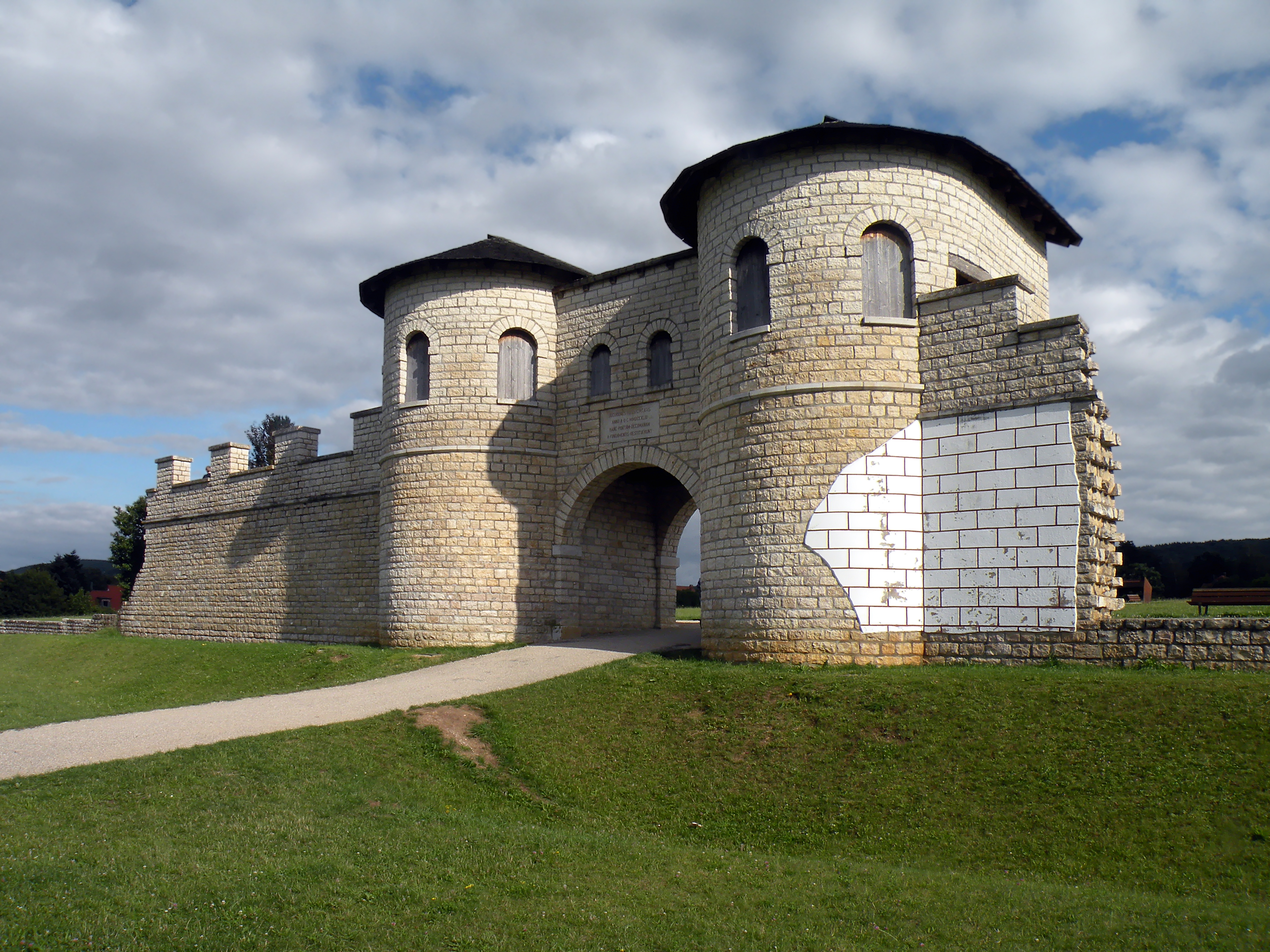 Biriciana gate. Weissenburg.